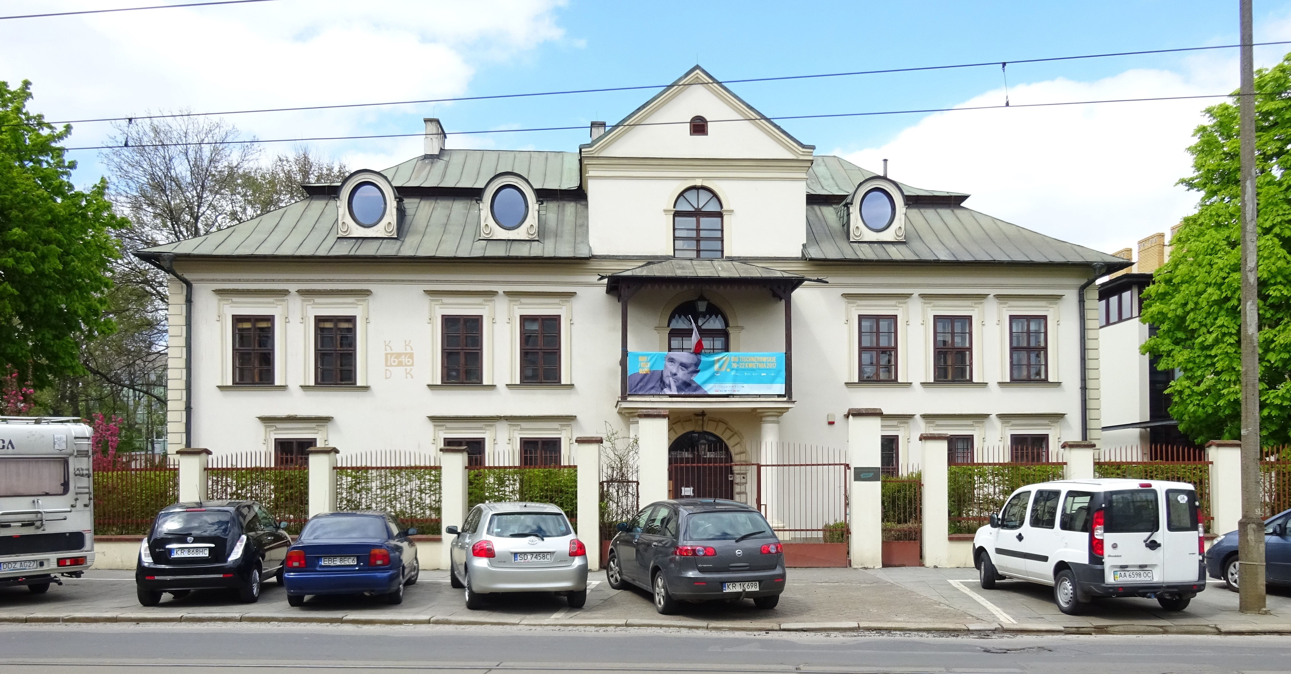 Dwór Łowczego w Krakowie, widok od strony ulicy (od południa). 2017